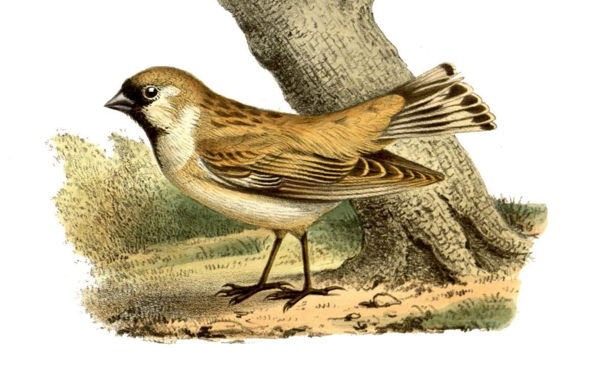 Montifringilla davidiana